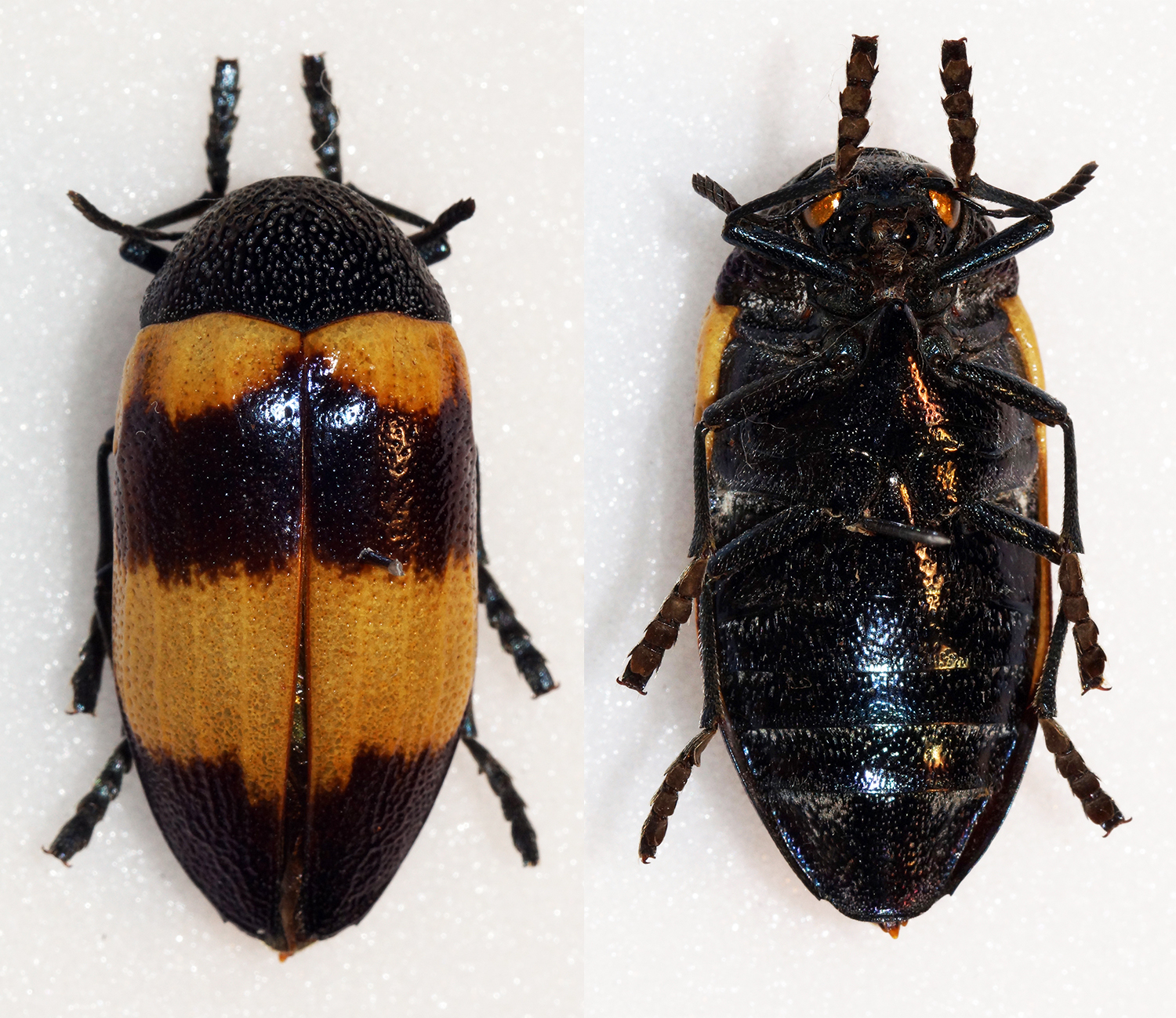 Waterhouse,1889 Sex: ? Data: 21-03-12 - Ruparama - Tosamaganga - Tanzania Size: 29mm